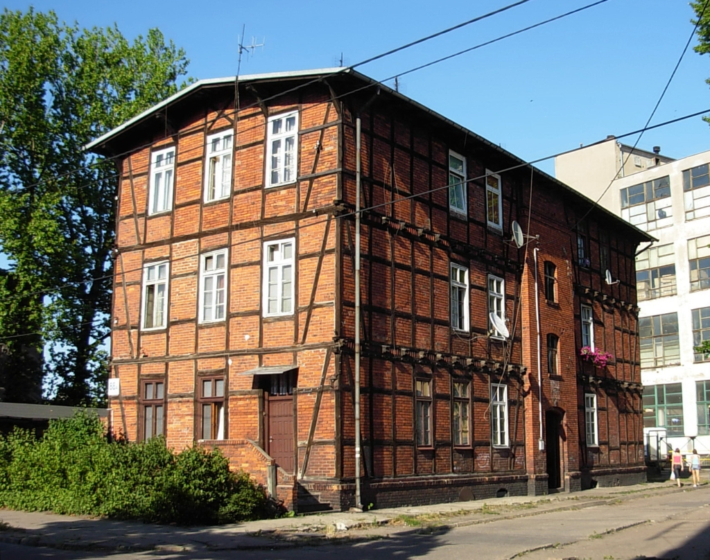 Osiedle Londynek (koszary wybudowane w latach 70. XIX w.) u wylotu ul. Pomorskiej w Bydgoszczy